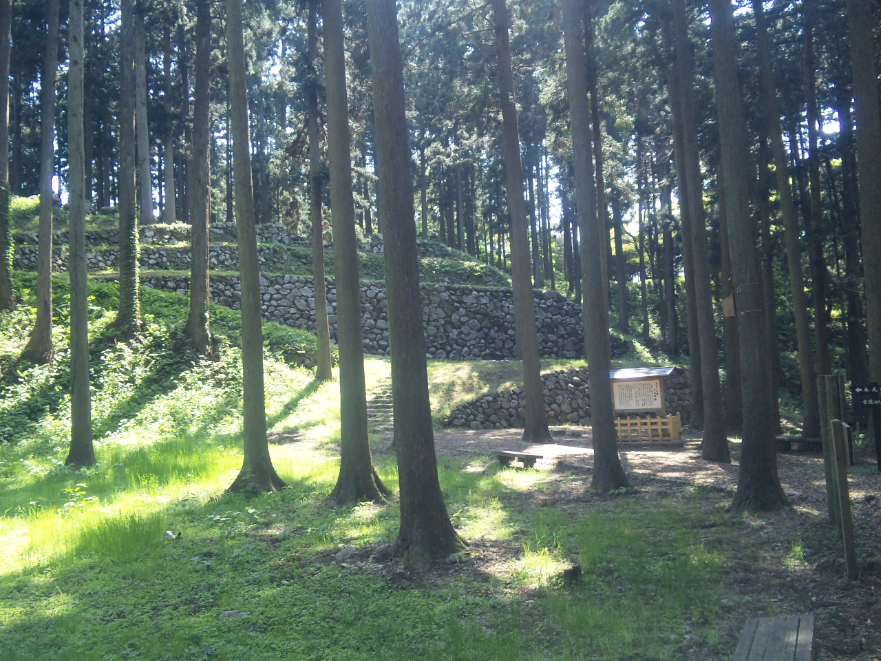 七尾城跡調度丸